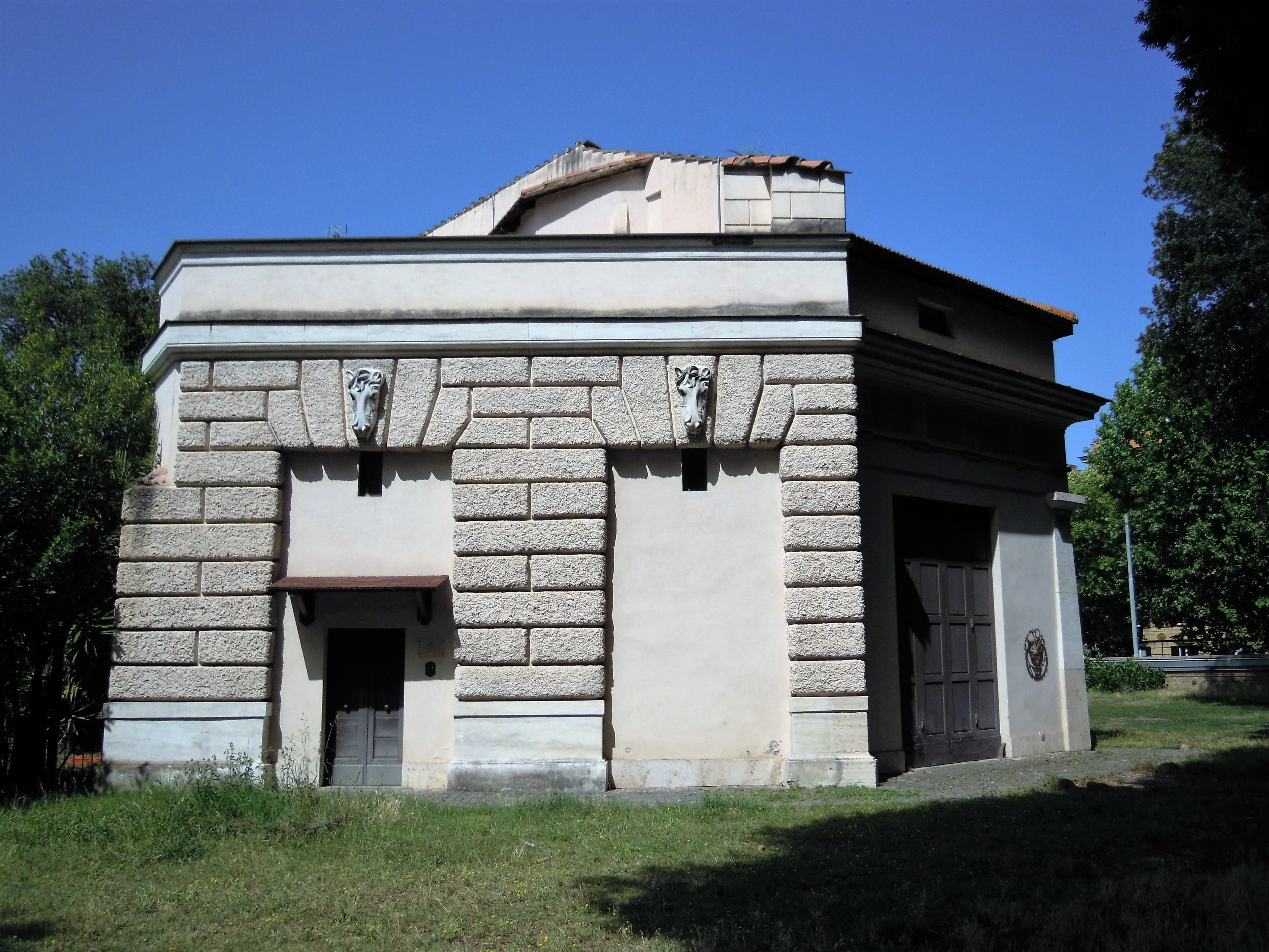 Roma, Villa Torlonia: vecchie scuderie